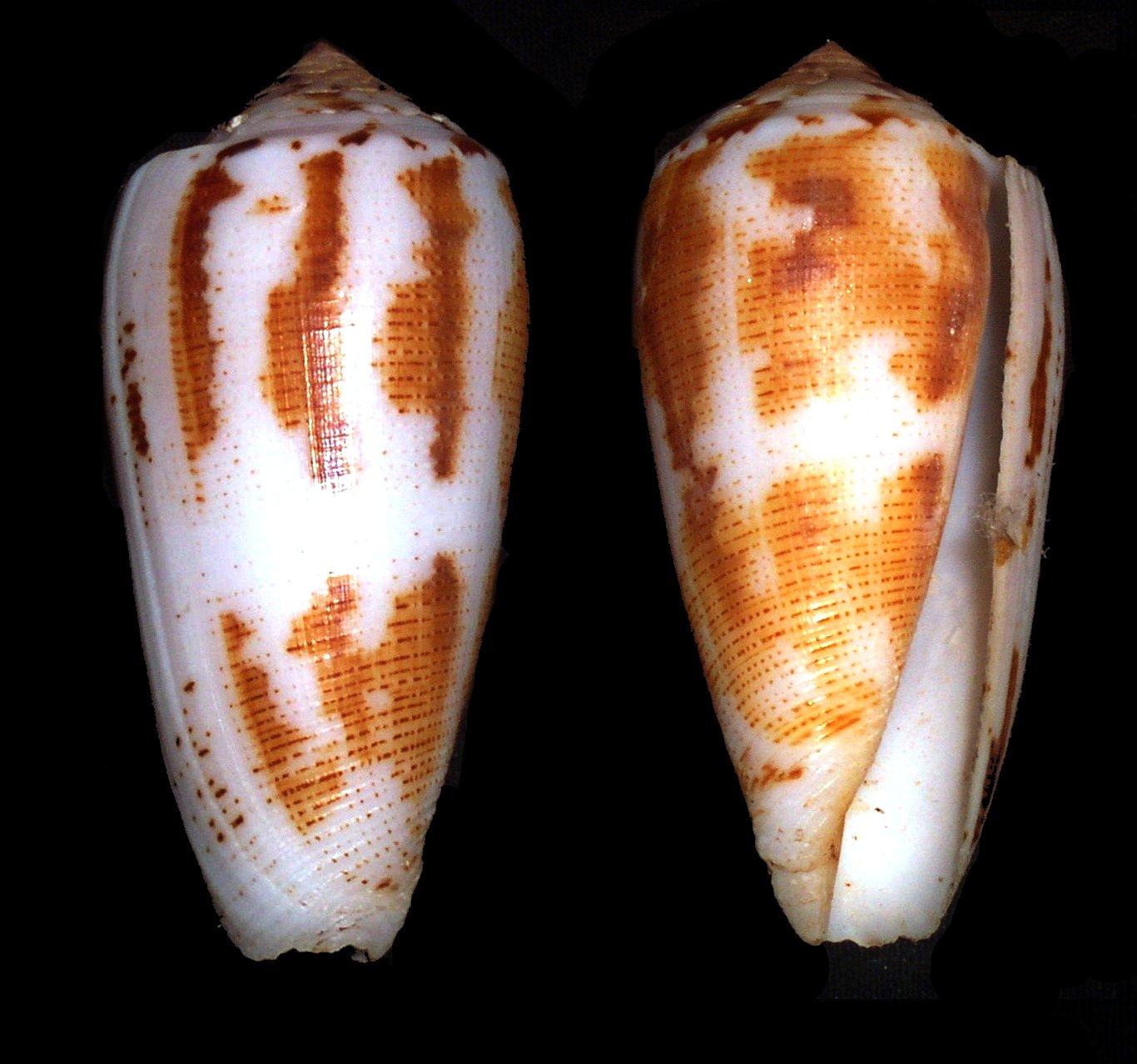 Conus magus 56mm